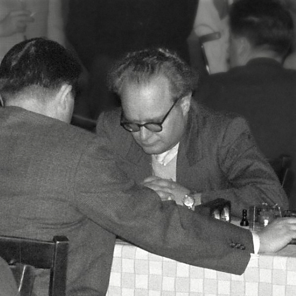 Wolfgang Heidenfeld (links Walter Jäger) bei der Hessenmeisterschaft 1960, fotografiert von Gerhard Hund